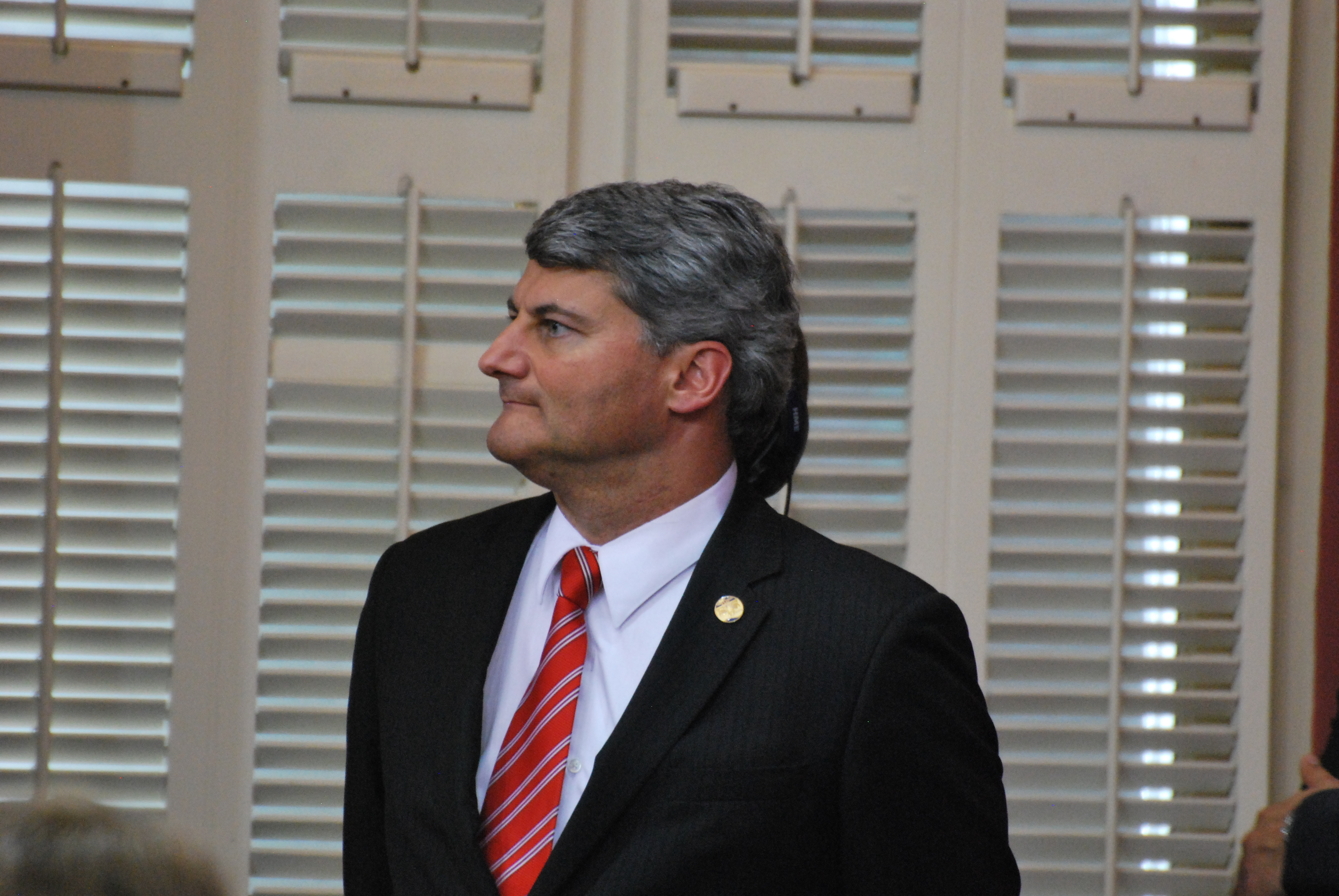 Cérémonie de remise de l'ordre national du Québec 2013. Gérard Deltell